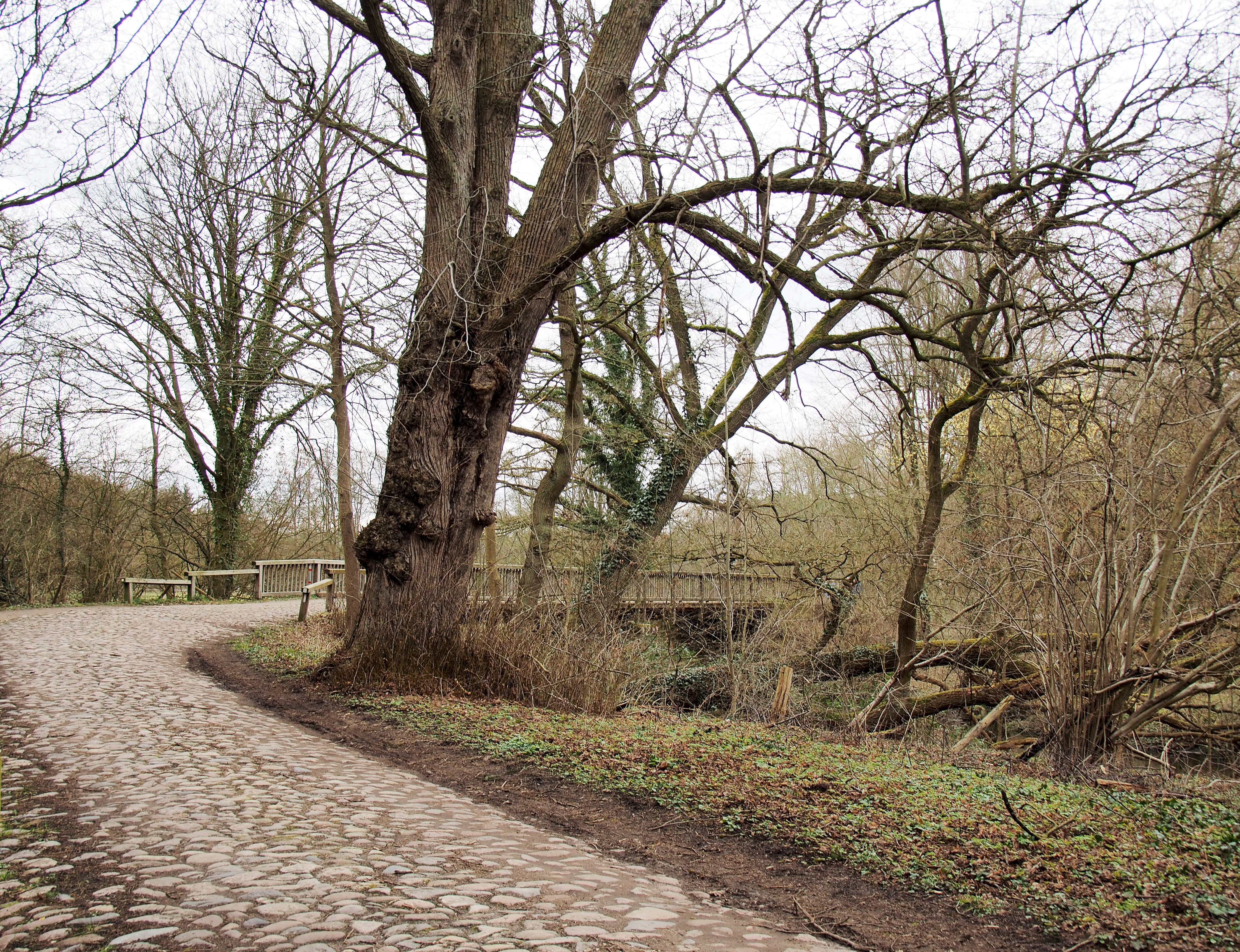 Königsbrücke über die Ilmenau in Medingen (Bad Bevensen). Der Ort, an dem einst die Könige Georg III. und Georg V. von Hannover die Ilmenau passierten.